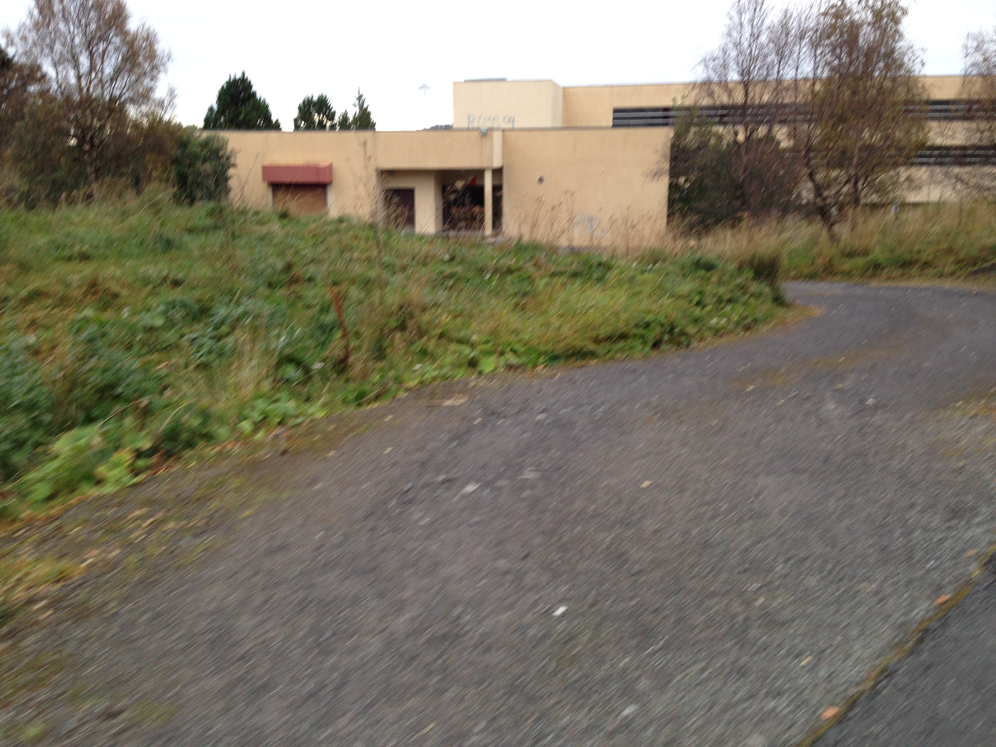 Baksiden av gamle Bodø lærerhøgskole.